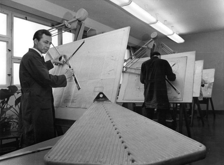 Factual corrections and alternative descriptions are encouraged separately from the original description. Additionally errors can be reported at this page to inform the Bundesarchiv. Original historic description: Ingenieure an Reissbrettern Zentralbild Ritter 11.12.67 Staßfurt: Einsatz von Plaste im Chemie-Apparatebau Im VEB Maschinen- und Apparatebau Staßfurt leistet eine Arbeitsgemeinschaft "Ökonomischer Materialeinsatz" des Filtertechnikums Pionierarbeit beim verstärkten Einsatz von Kunststoffen im Chemianlagenbau. Im Technikum wurden verschiedene Funktionsmuster von Filtern erprobt, bei denen einzelne Elemente statt aus Edelstahl aus Plaste hergestellt sind. Edelstahlelemente sind in der Formgebung und der Oberflächenvergütung sehr arbeitsaufwendig, Plasteteile lassen sich dagegen relativ billig pressen. Hier überarbeitet Ingenieur-Konstrukteur Willi Pett die Konstruktion eines Segmentes nach den bei der Erprobung gewonnen Erfahrungen. (Bitte beachten Sie auch unser Foto F 1211-18-1N)